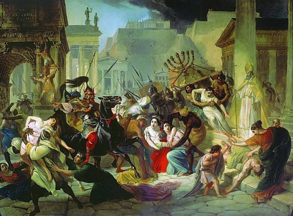 Sacco di Roma 455. Нашествие Гензериха на Рим. Холст, масло. 88x117,9 см. Государственная Третьяковская галерея, Москва